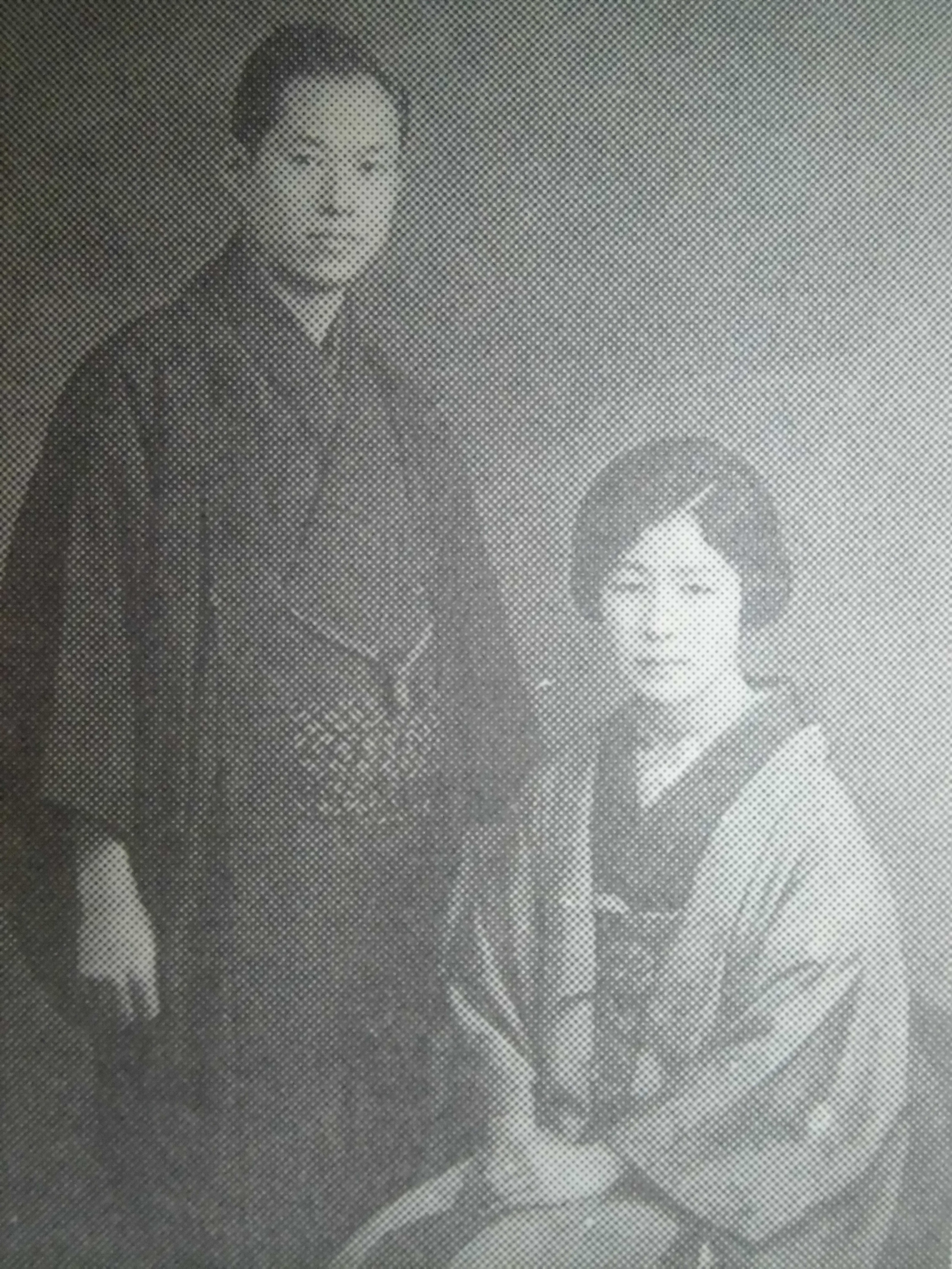 青木家（Aoki Kinichi）